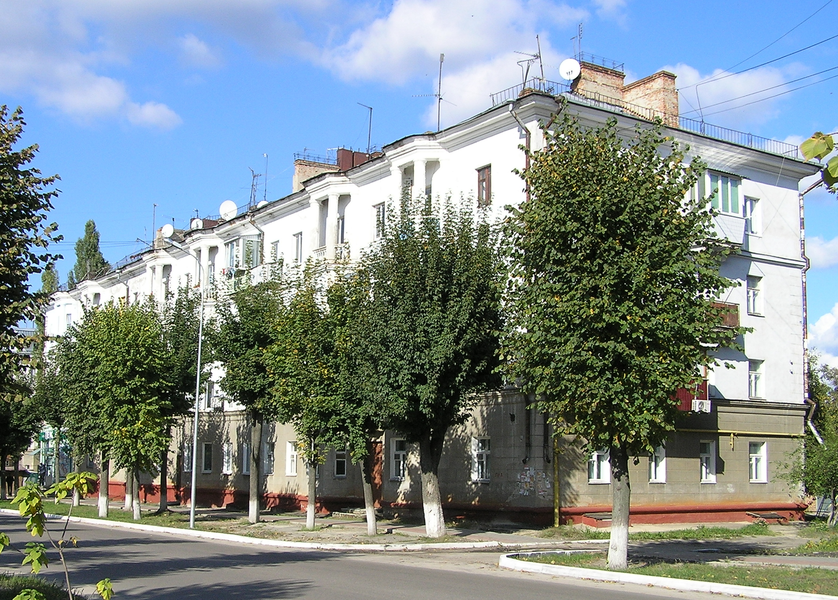 Житловий будинок, Шостка, вул. Депутатська, 4.